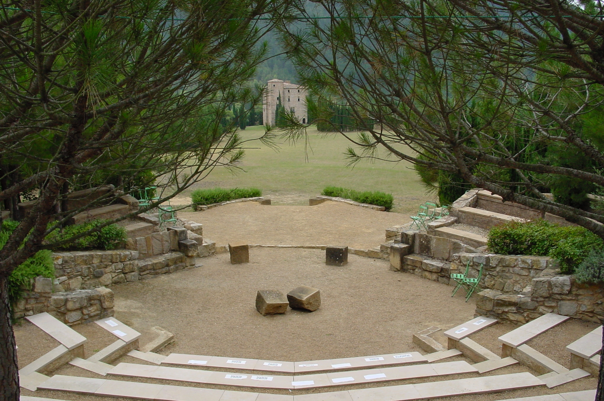 Théâtre de Serres (France)